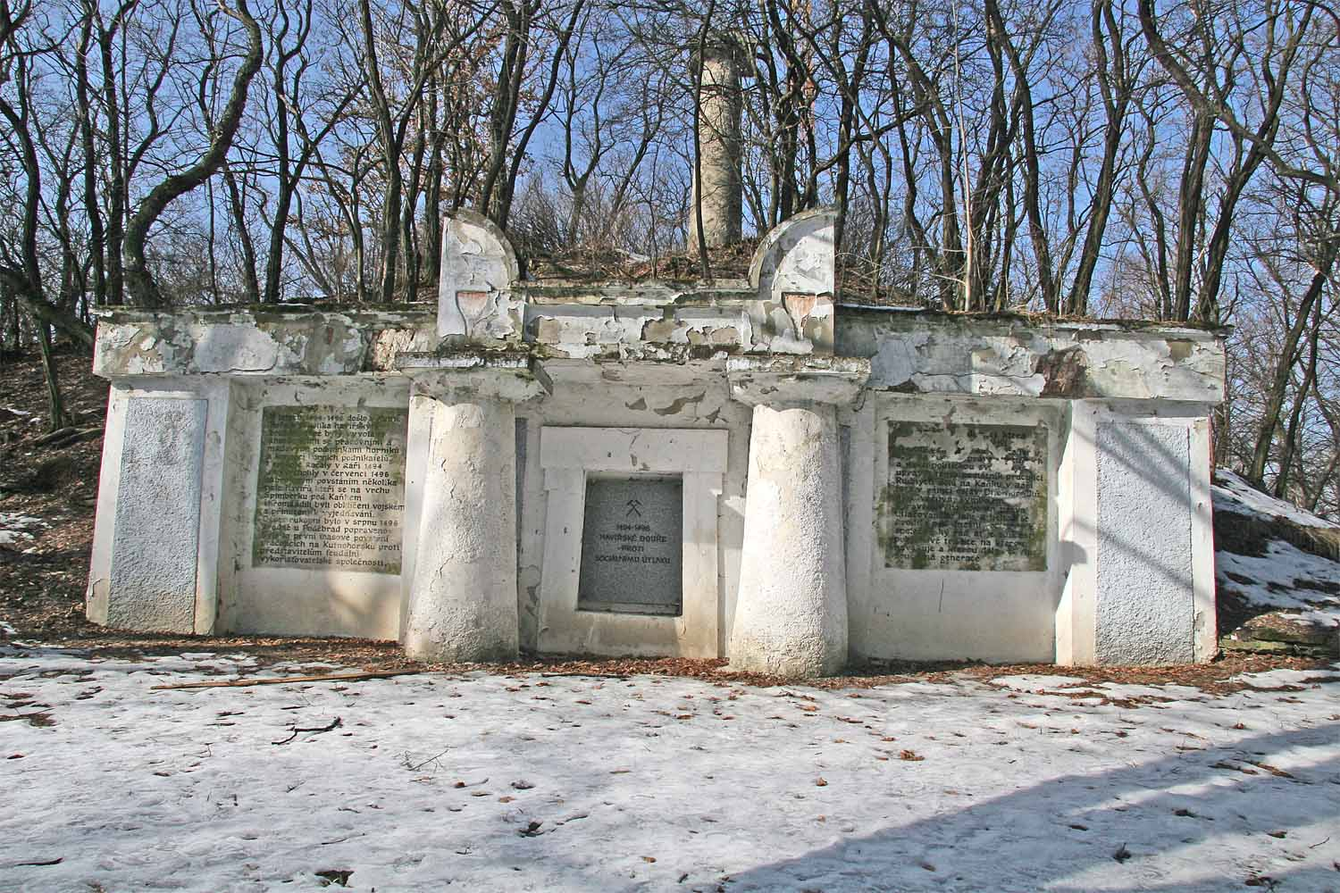 Památník Na Kalvárii na vrcholu Kaňku na počest popravených vůdců hornických bouří z let 1494–1496 vybudovaný hrabětem R. Chotkem v roce 1814.